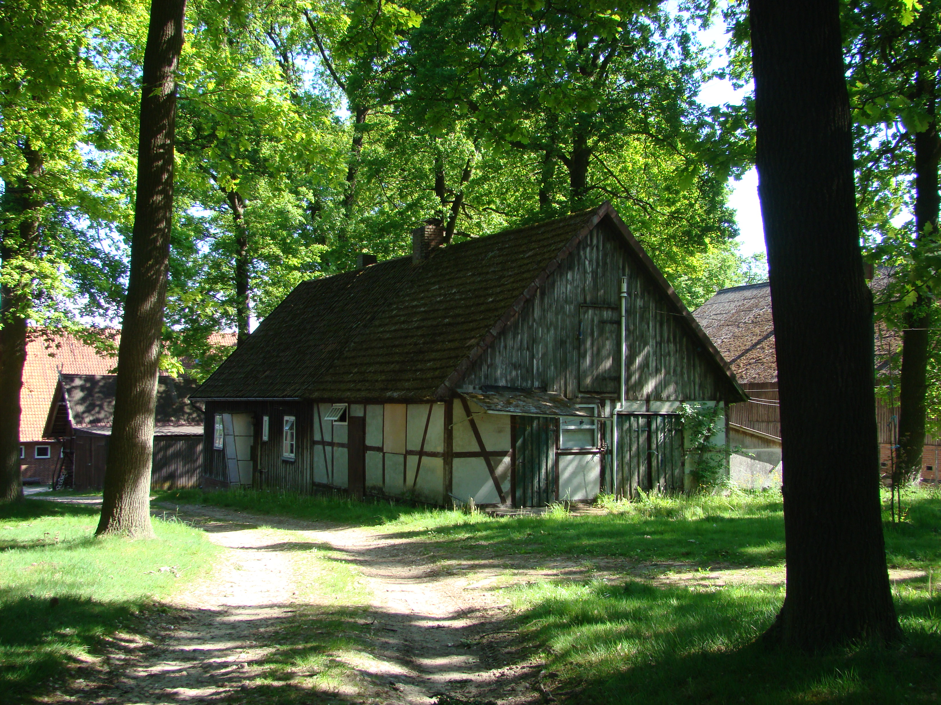 Häuslingshaus in Beckedorf (Landkreis Celle)